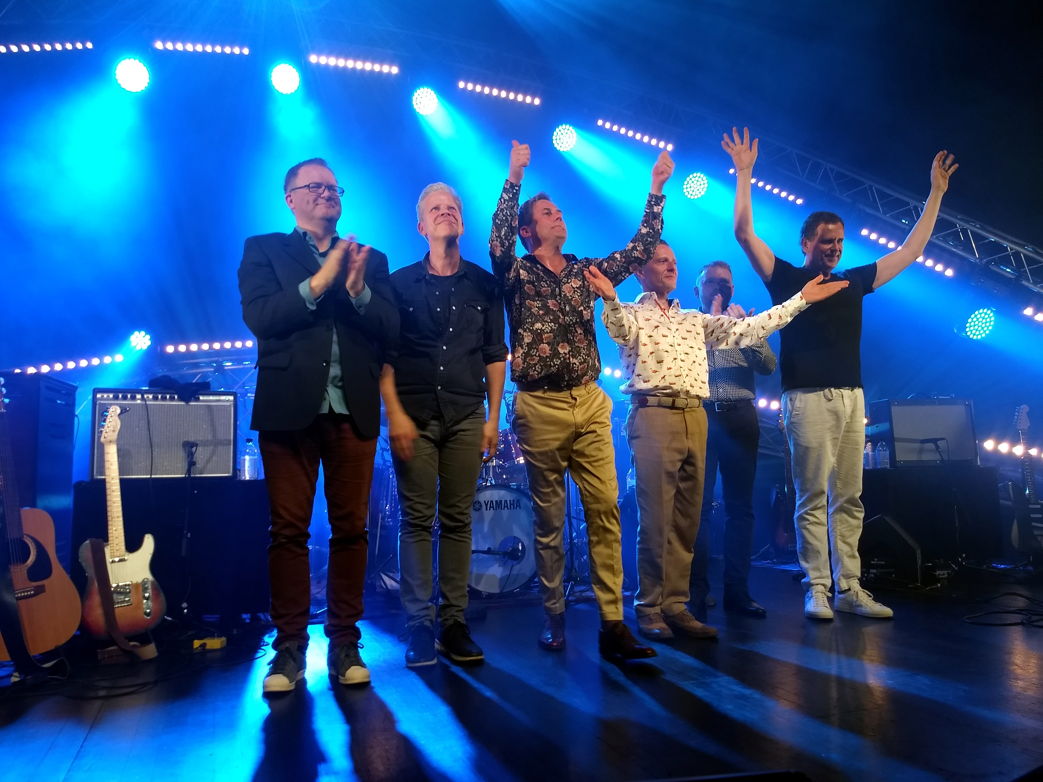 Hljómsveitin Nýdönsk í lok tónleika í Hörpu í september 2018.